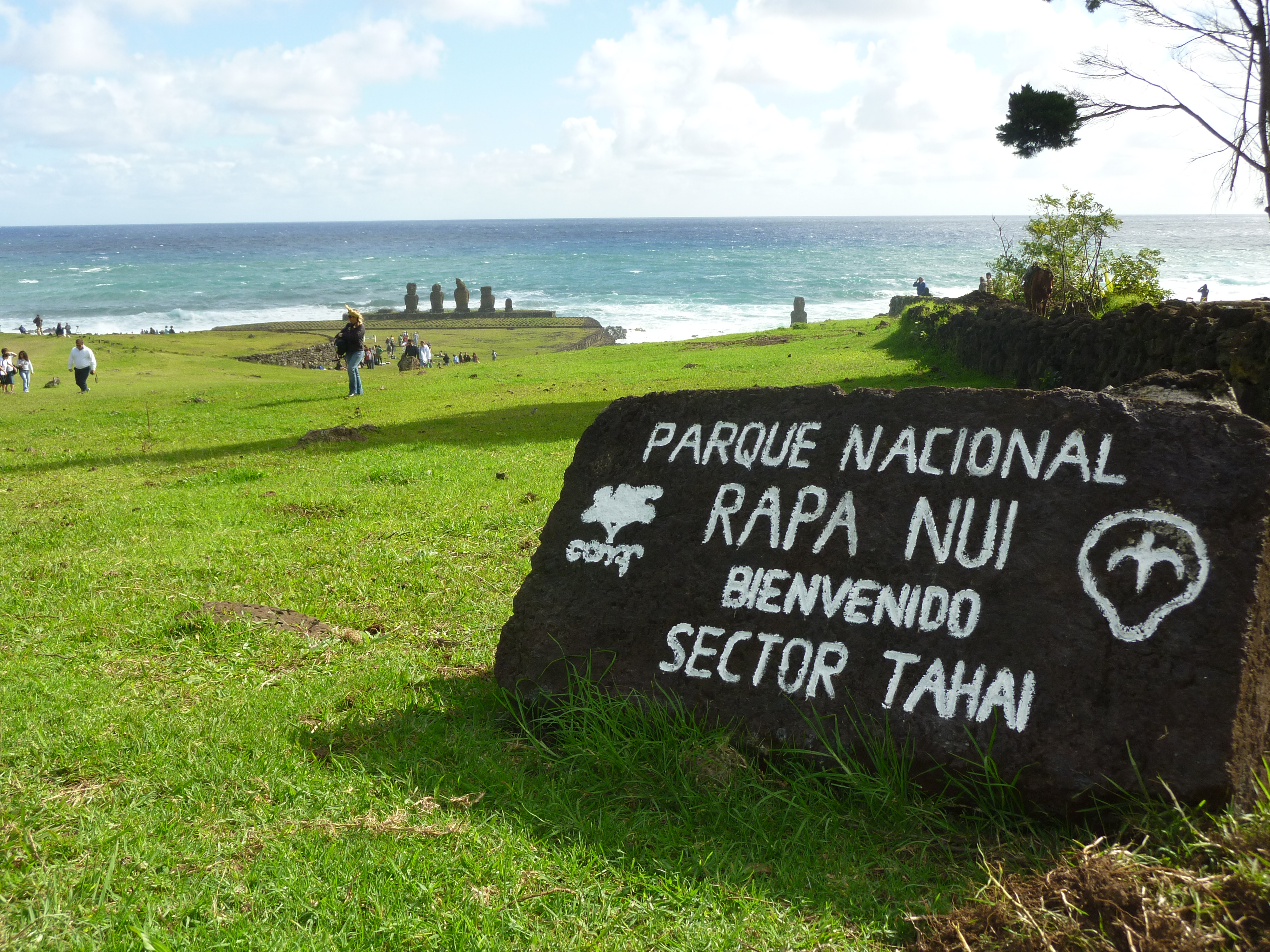 Parque Nacional Rapa Nui. Isla de Pascua, Chile.